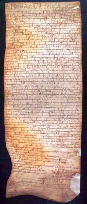 Testament des Bischofs von Olivolo, Ursus, aus dem Jahr 853, Abschrift des 12. Jahrhunderts